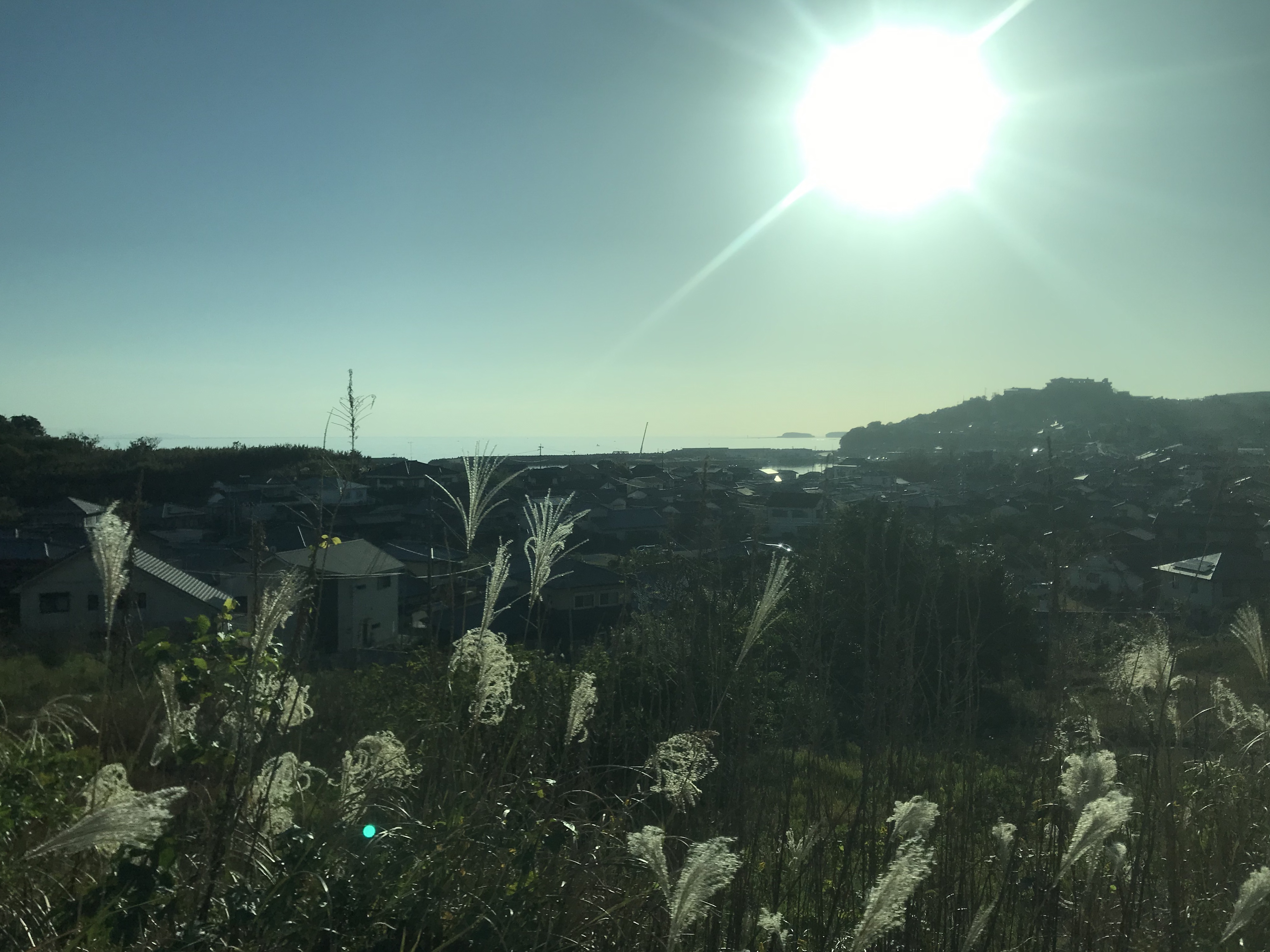 国道251号のバス車内より望む諫早市松里町・有喜町